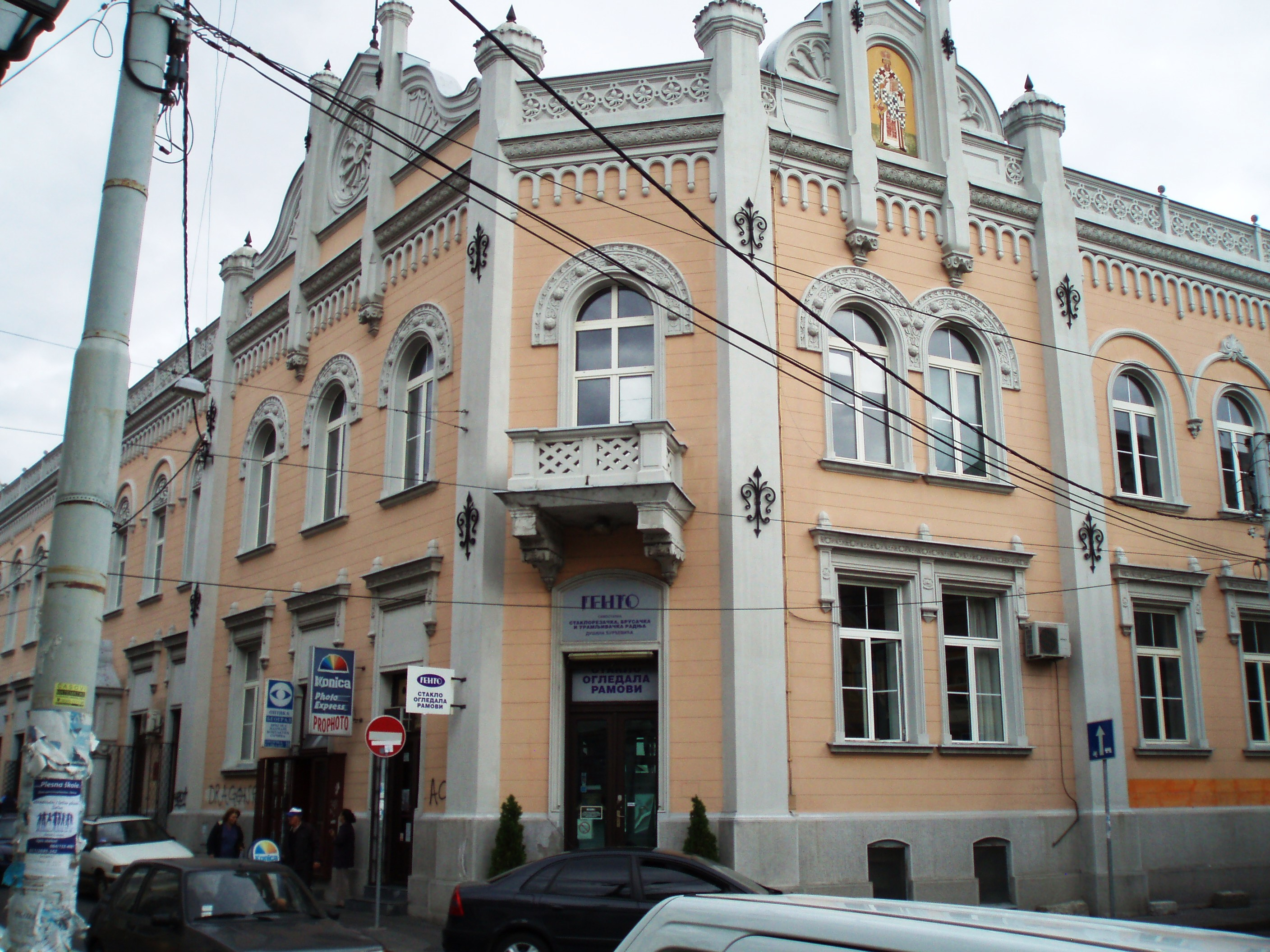 Dom srpske pravoslavne opštine u Zemunu, ugao Bežanijske i Svetosavske ulice, autor fotografije: Nicolo